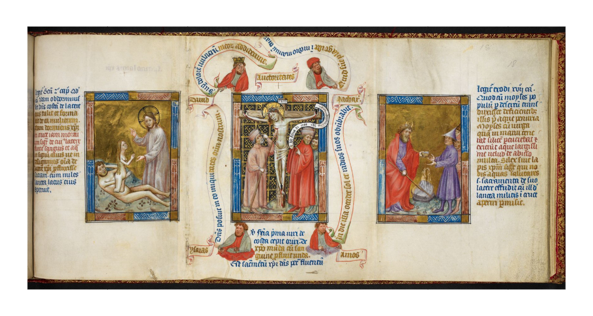 King MS 5 f18r